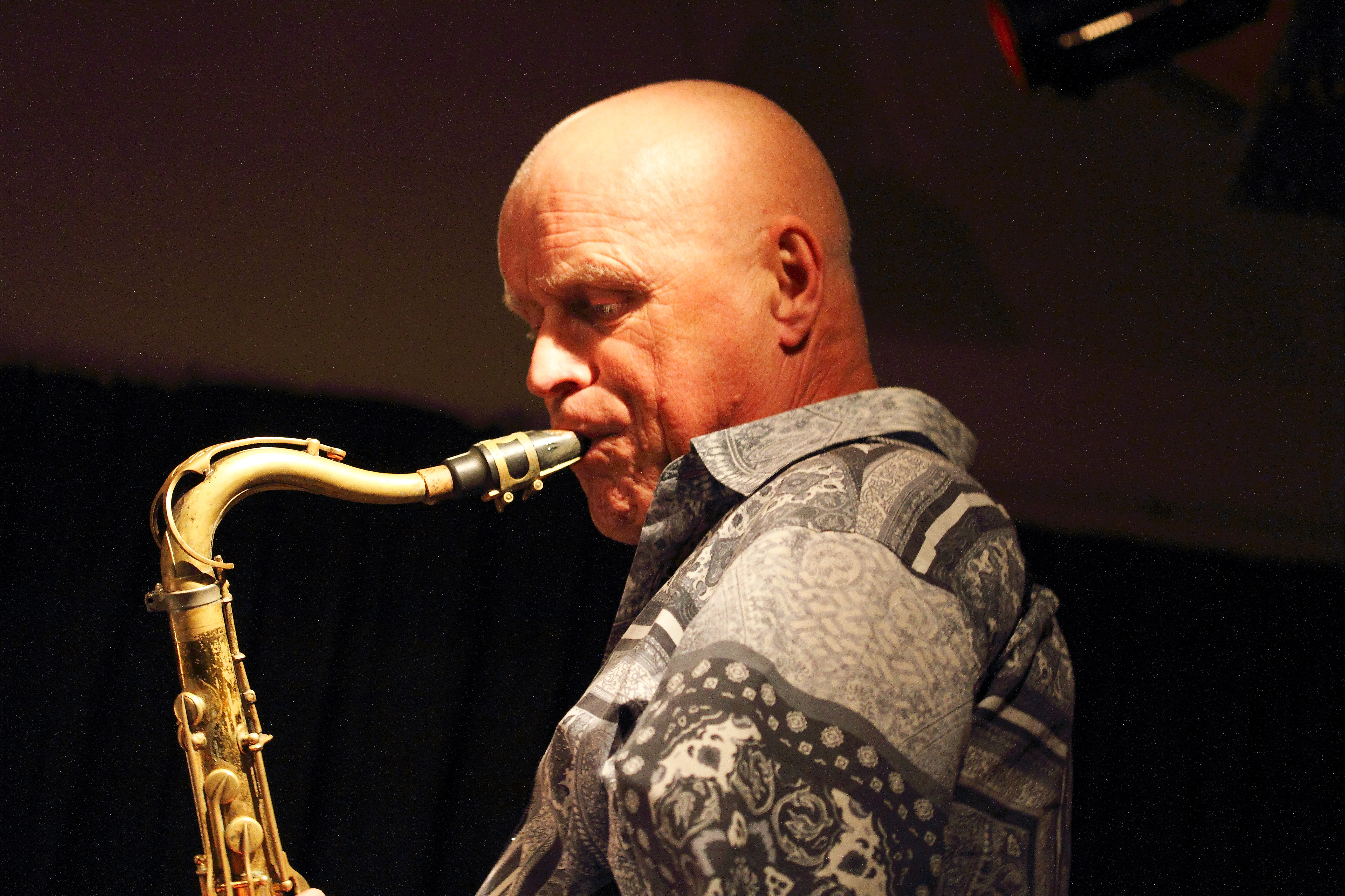 Konzert von Ullmann/Swell´s Chicago Plan im Club W71 in Weikersheim. Chicago Plan sind: Gebhard Ullmann (sax, bcl), Steve Swell (tromb), Fred Lonberg-Holm (cello, electr) und Michael Zerang (dr).